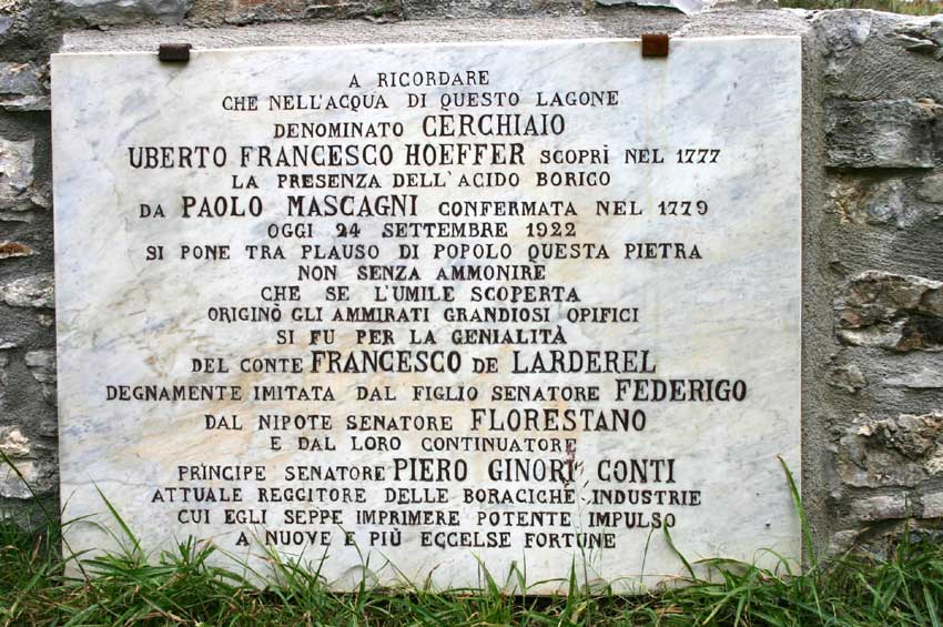 "A ricordare che nell'acqua di questo lagone denominato Cerchiaio, Uberto Francesco Hoeffer scopri nel 1777 la presenza dell Acido borico, da Paolo Mascagni confermata nel 1779. Oggi 24 settembre 1922, si pone tra plauso di popolo questa pietra, non senza ammonire che se l'umile scoperta origino gli ammirati grandiosi opifici, si fu per la genialità del conte Francesco de Larderel, degnamente imitata del figlio senatore Federigo, dal nipote senatore Florestano e dal loro continuatore principe senatore Piero Ginori Conti, attuale reggitore delle boraciche industrie cui egli seppe imprimere potente impulso a nuove e più eccelse fortune."